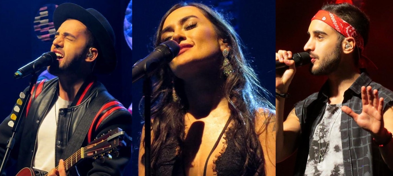 Banda Melim se apresentando em maio de 2019 no Teatro Bradesco, em São Paulo.